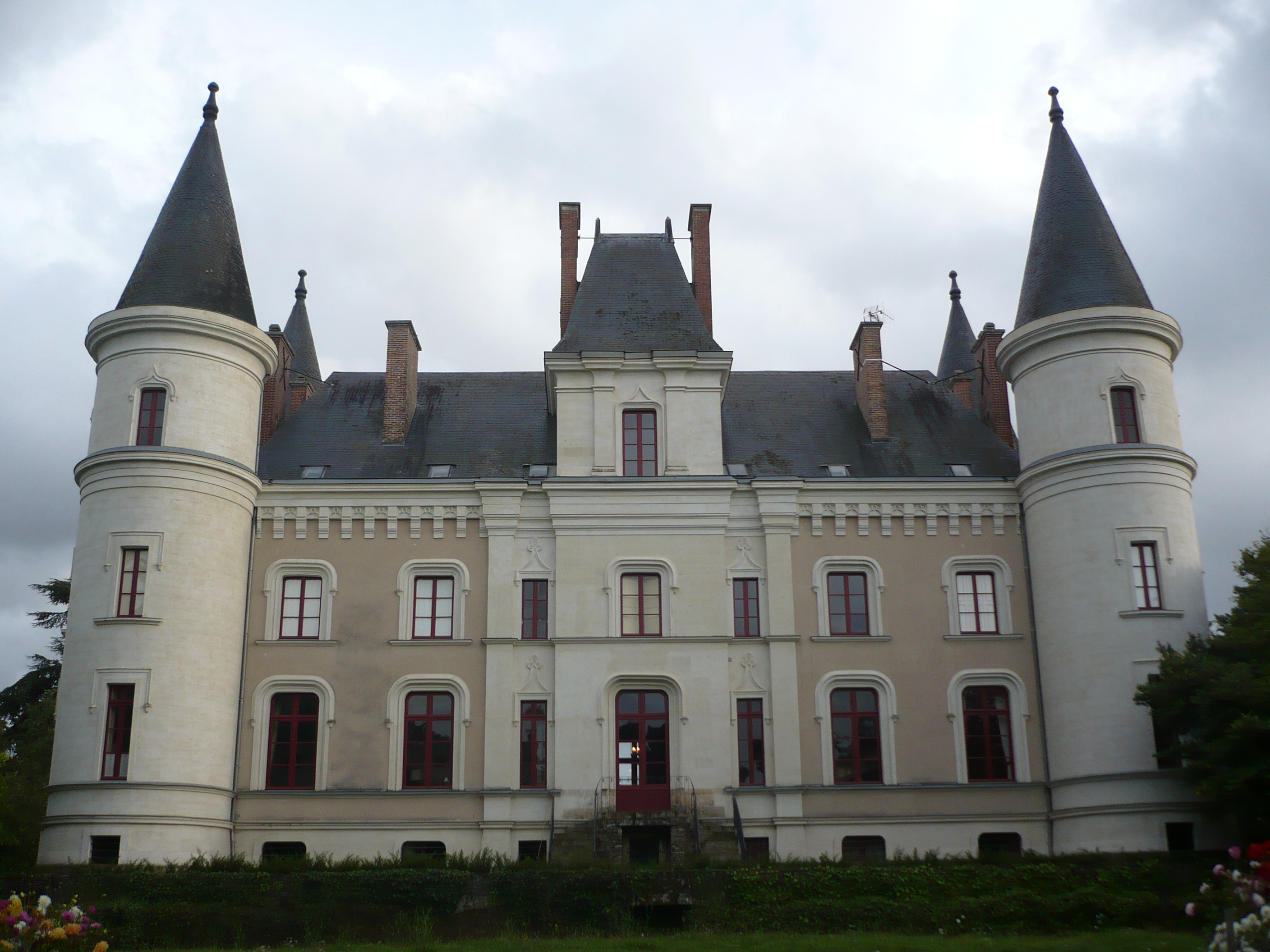 Façade nord du château d'Angrie, Maine-et-Loire